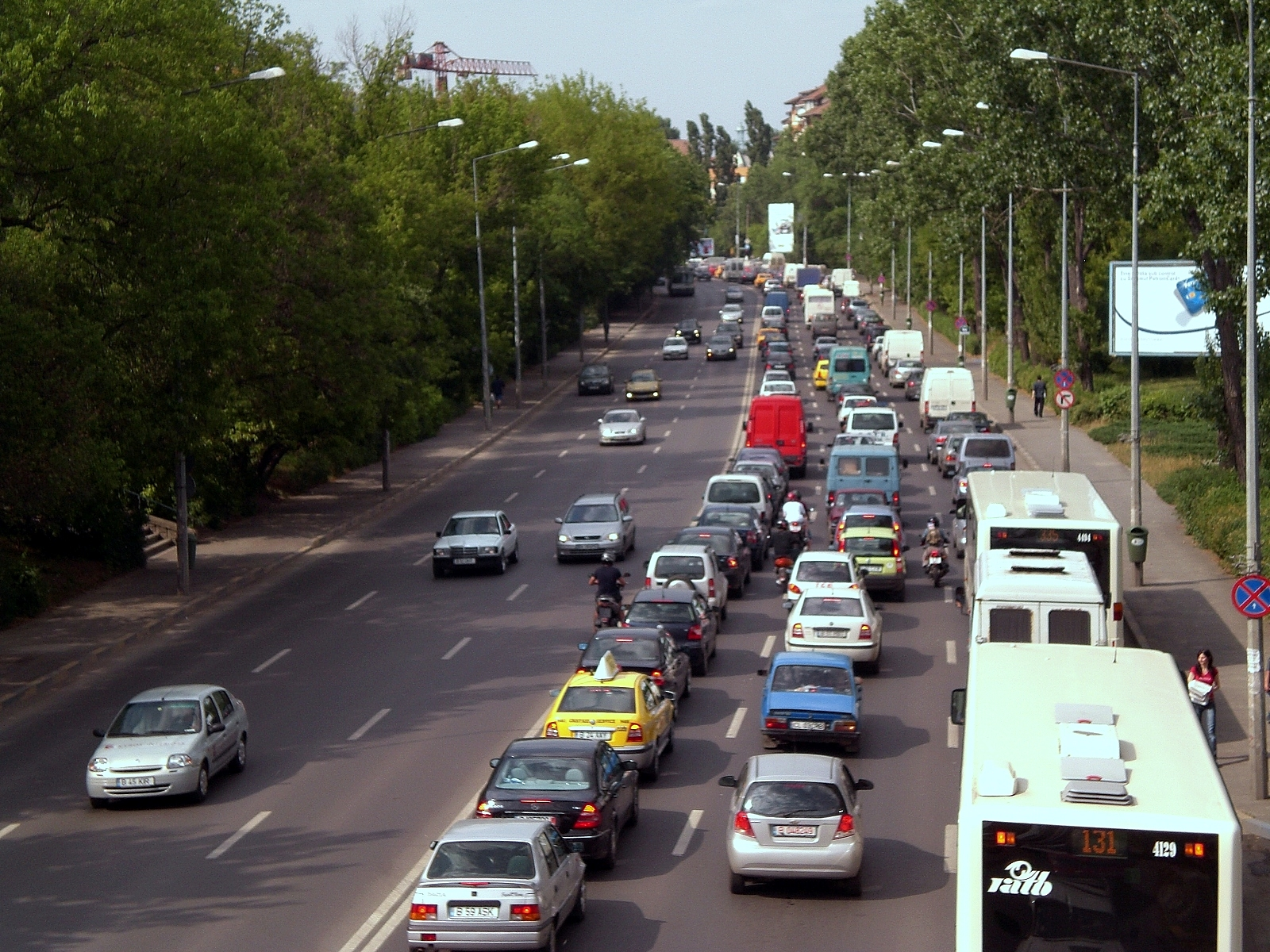 Bucharest Traffic in Băneasa.